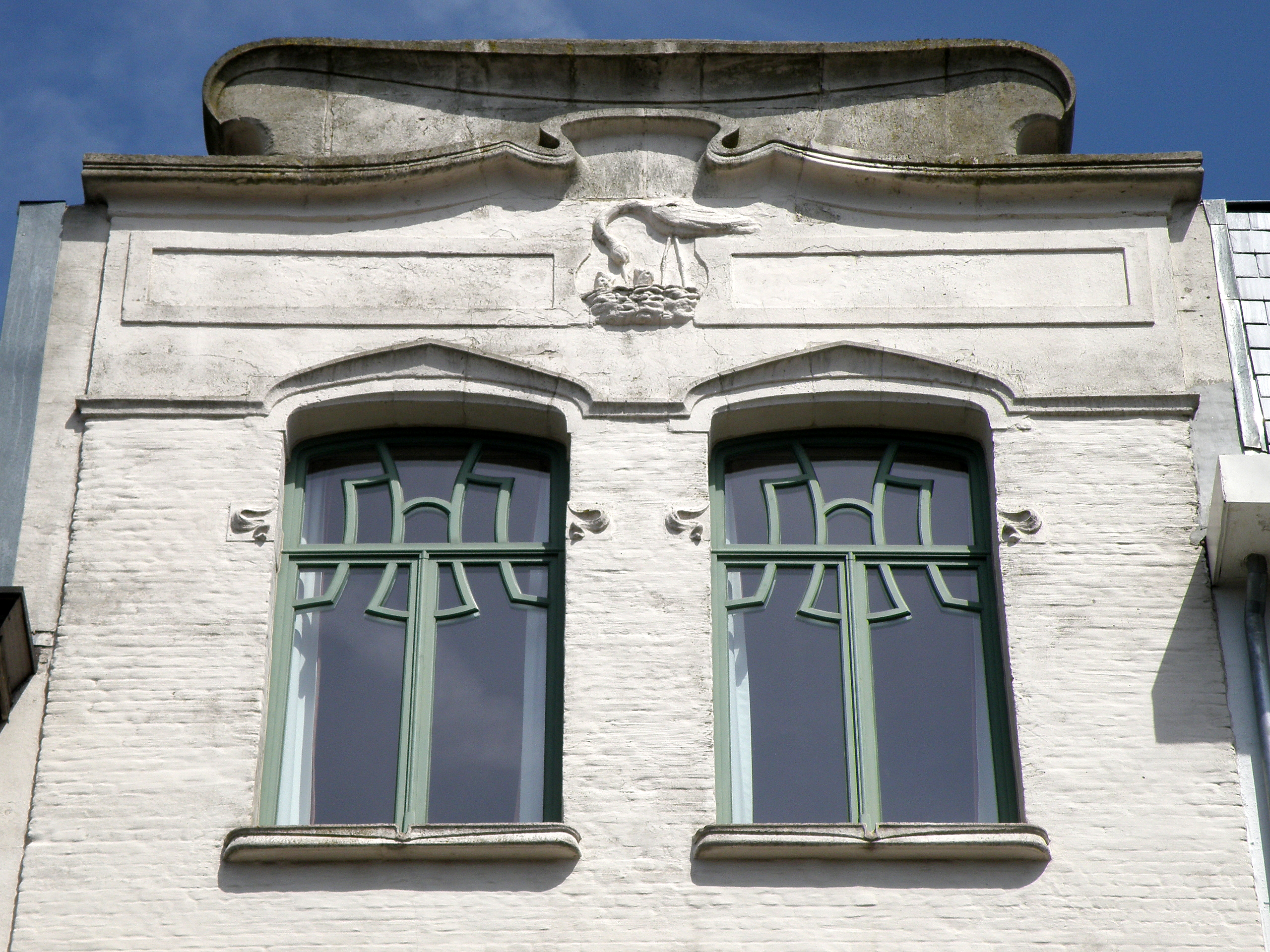 Antwerpen (België), Oostenstraat nr. 34. Art-nouveauwoning Huis Leys, anno 1906, n.o.v. archit. Jacques De Weerdt.